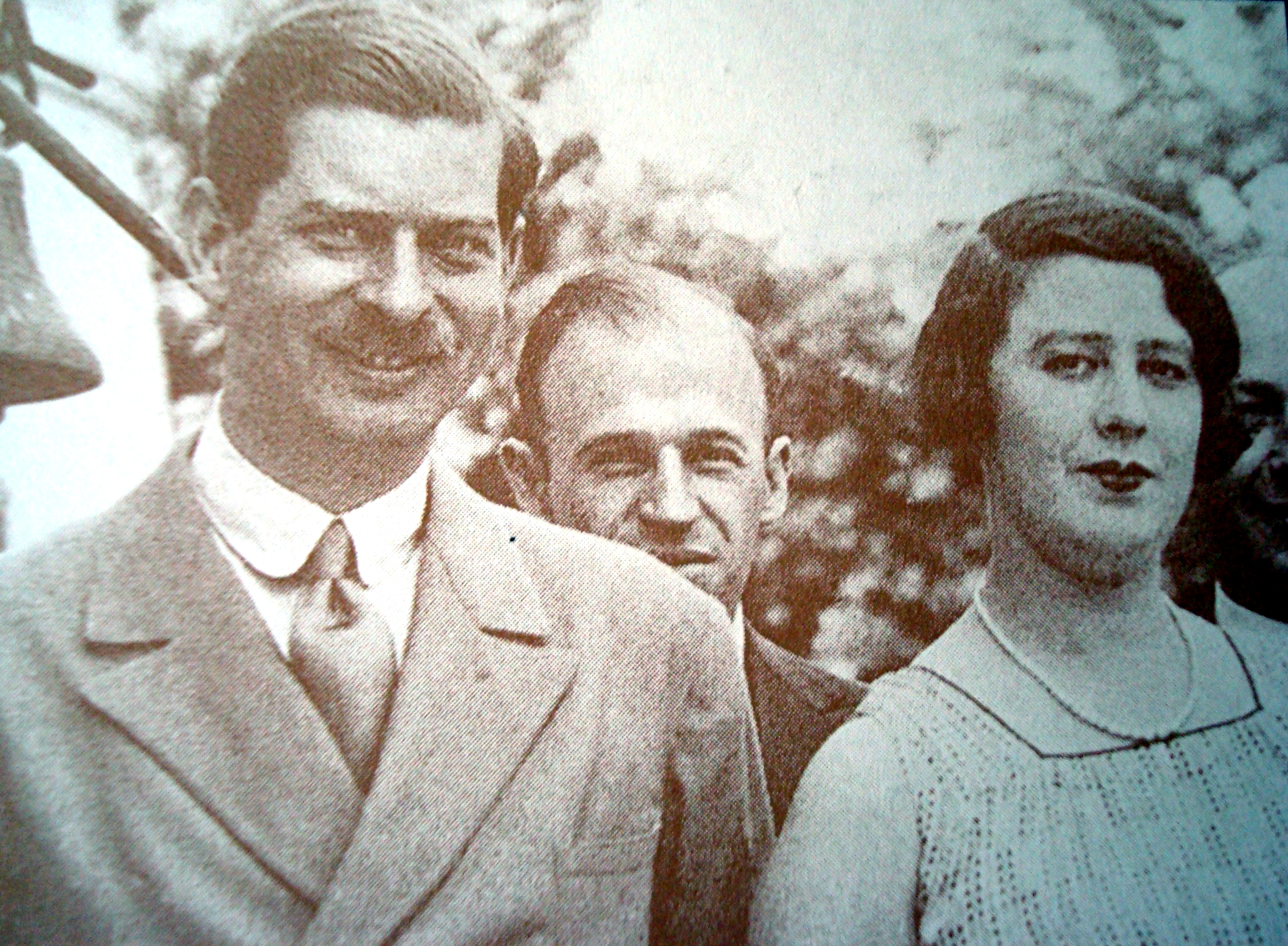 Magda Lupescu, kochanka króla Rumunii Karola II i później, po abdykacji, jego żona.